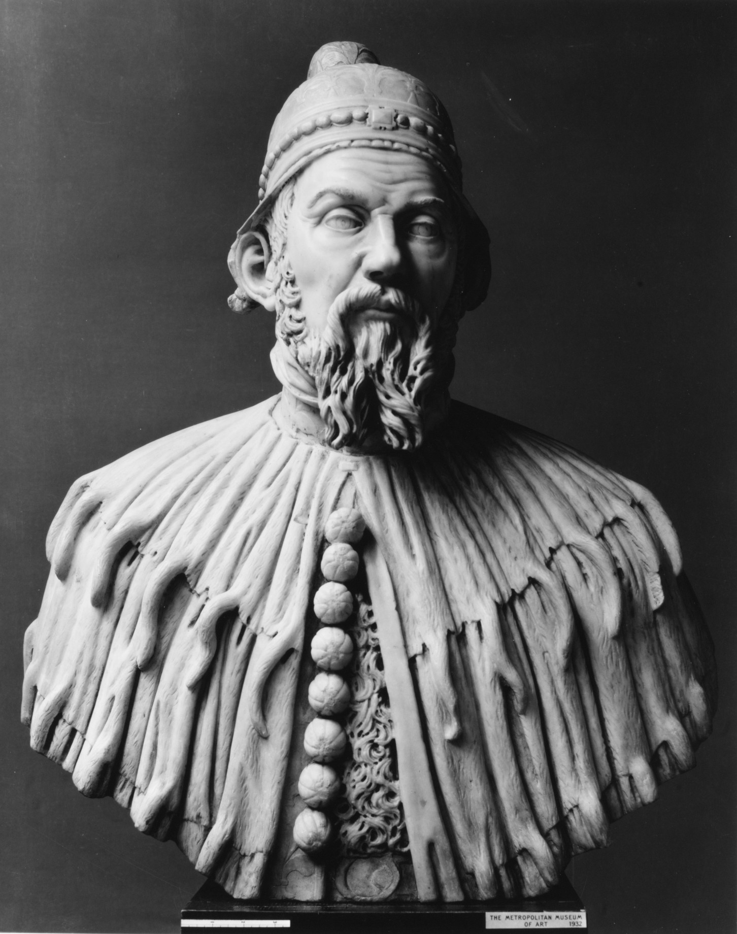 Italian, Venice; Bust; Sculpture